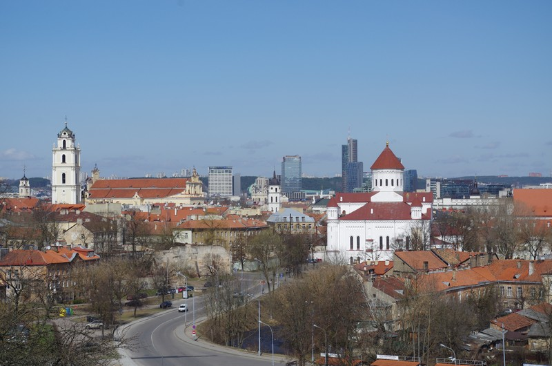 Maironio gatvė